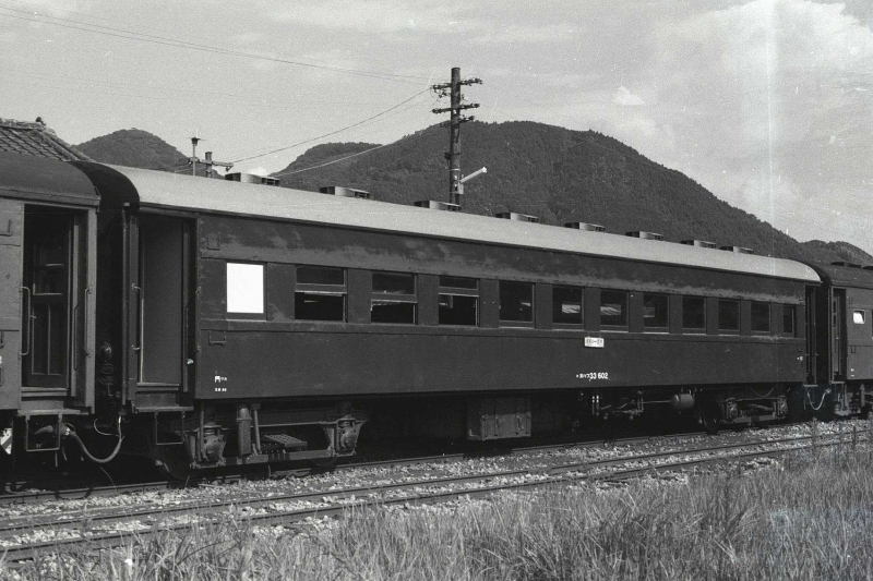 JNR Passenger car. Muroki Line, Fukuoka.(室木線にて) 国鉄オハフ33 602 （折妻、屋根に車端へのしぼりのない、いわゆるキノコ屋根タイプ）